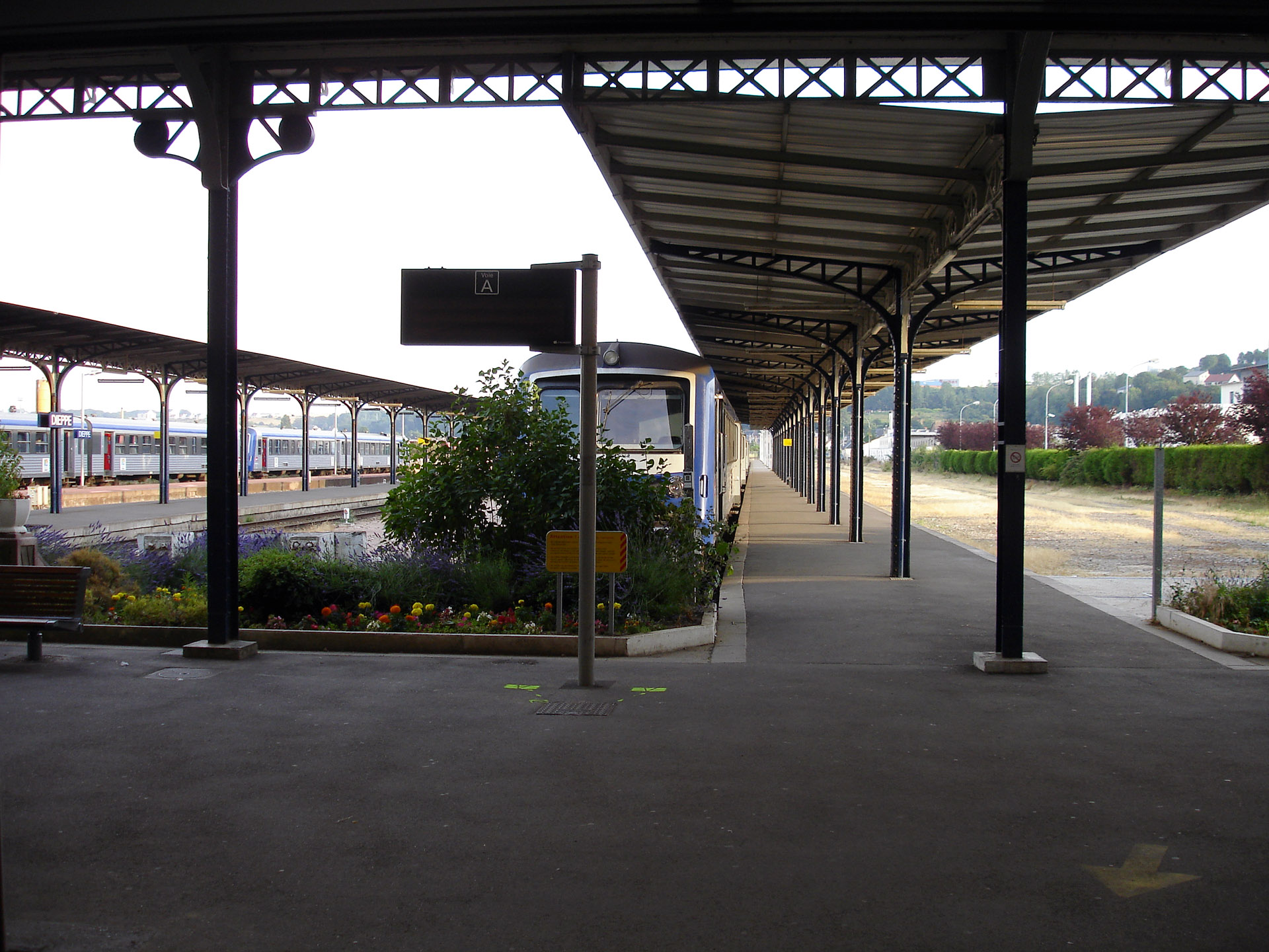 Autorail X 4900 en gare de Dieppe, Seine-Maritime, France, stationné à la voie A.